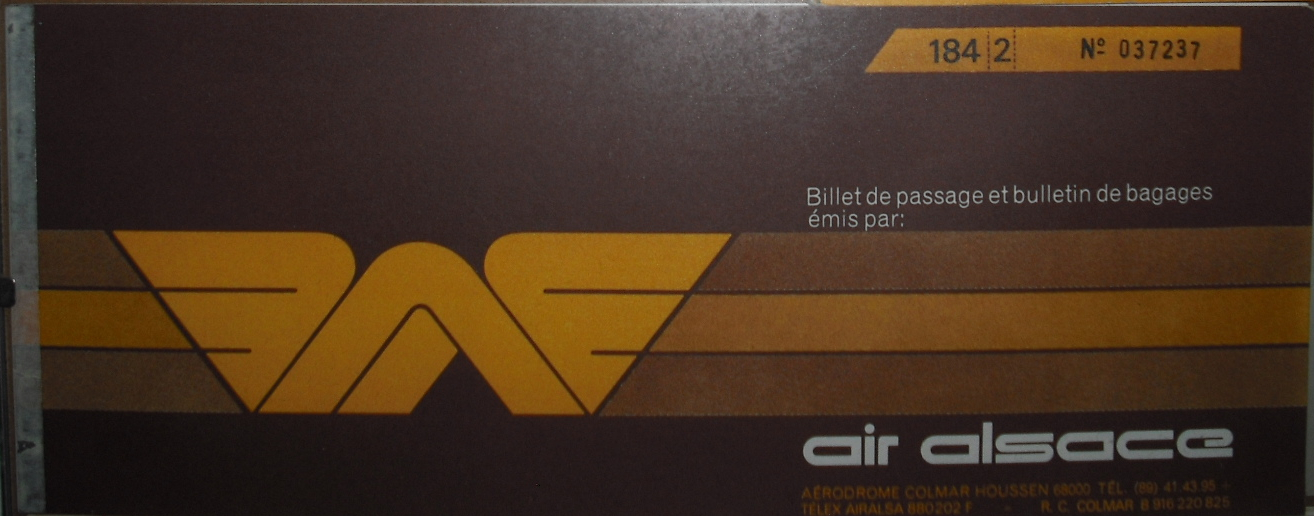 Couverture de billet de passage air Alsace